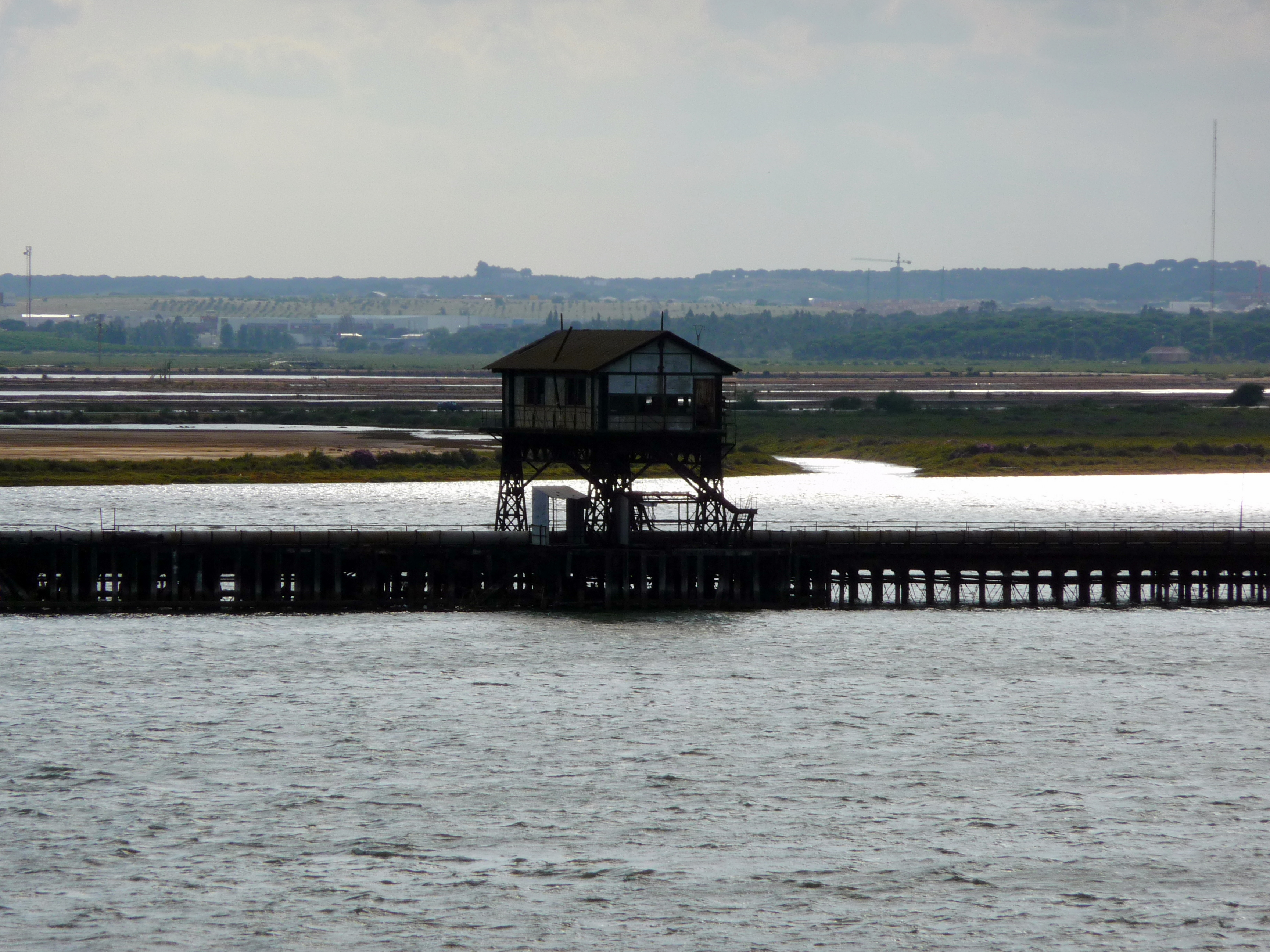 Muelle de Tharsis. Huelva (España)